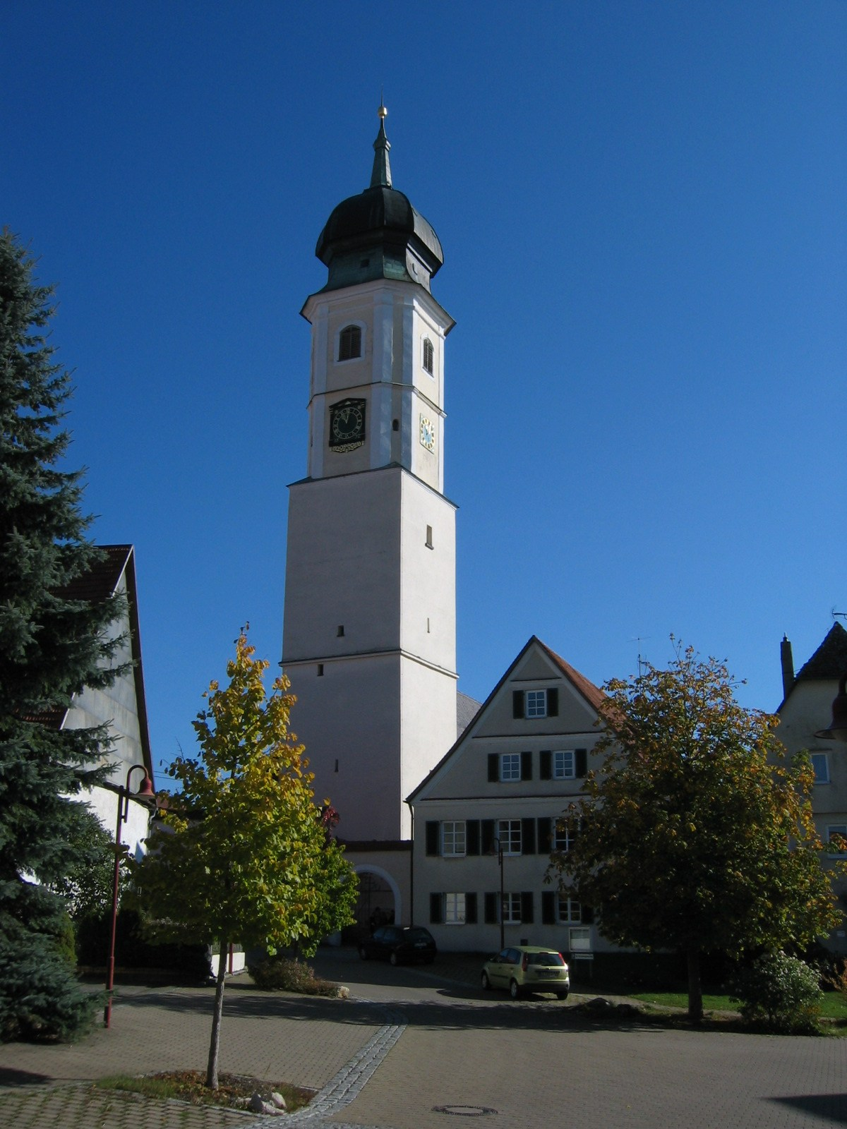 Merklingen, Alb-Donau-Kreis: Evangelische Pfarrkirche